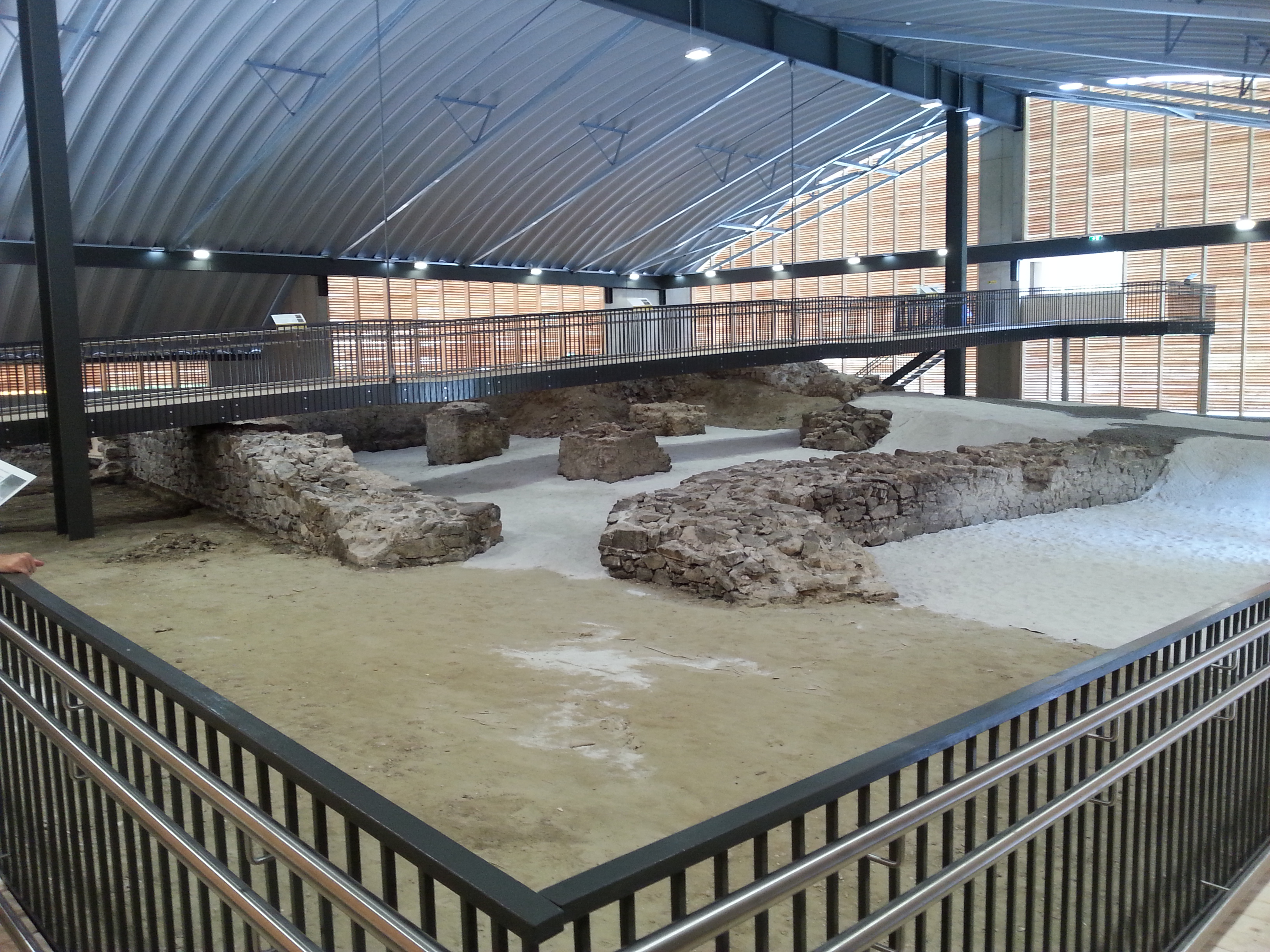 Die konservierten und 2018 mit einem Schutzbau überdachten Mauerreste des spätrömischen Burgus von Oberranna, Österreich